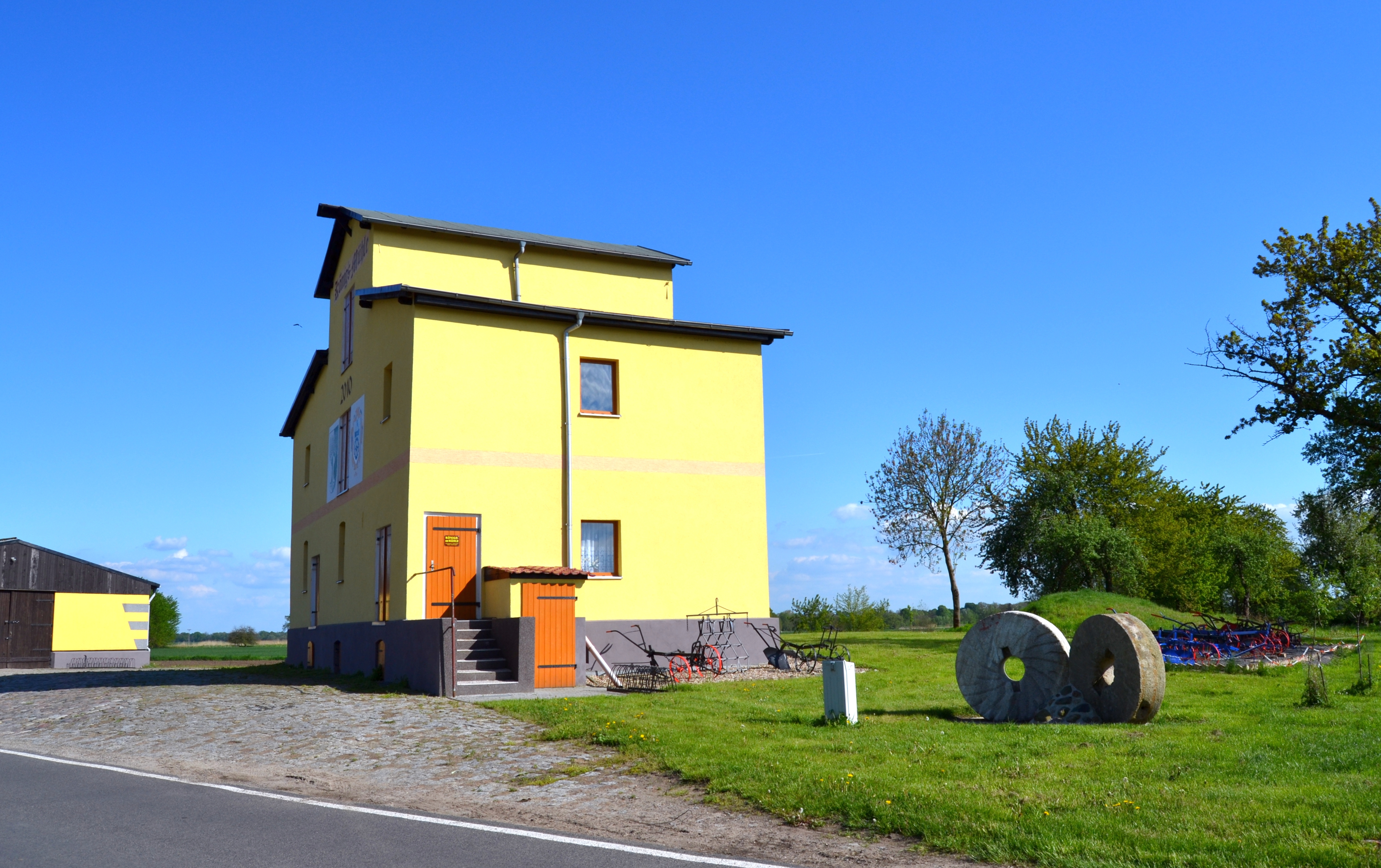 Königs-Mühle von Zechin.